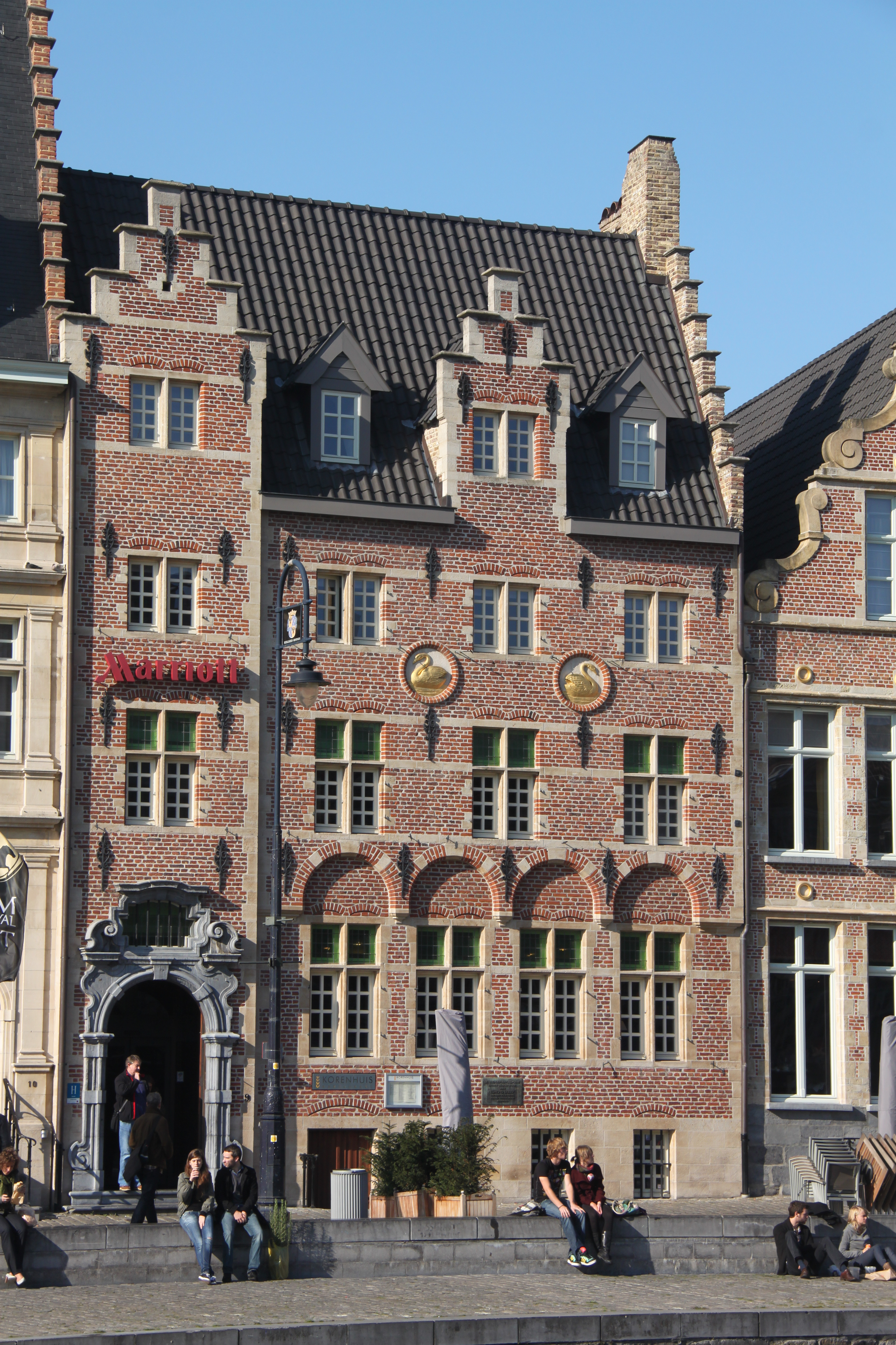 2011-10-23 in Ghent